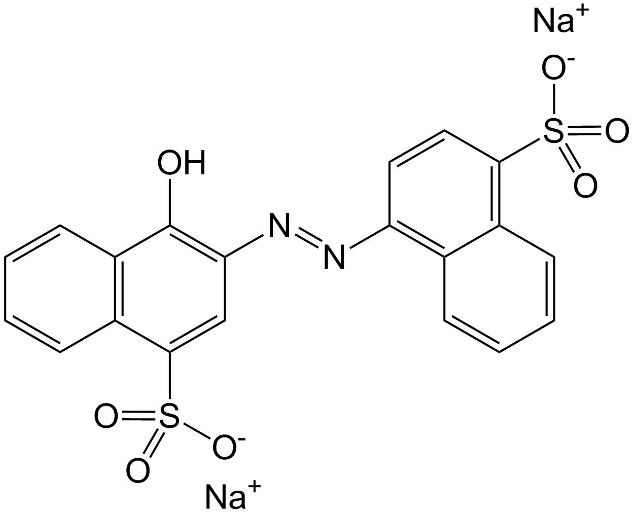 Azorubine